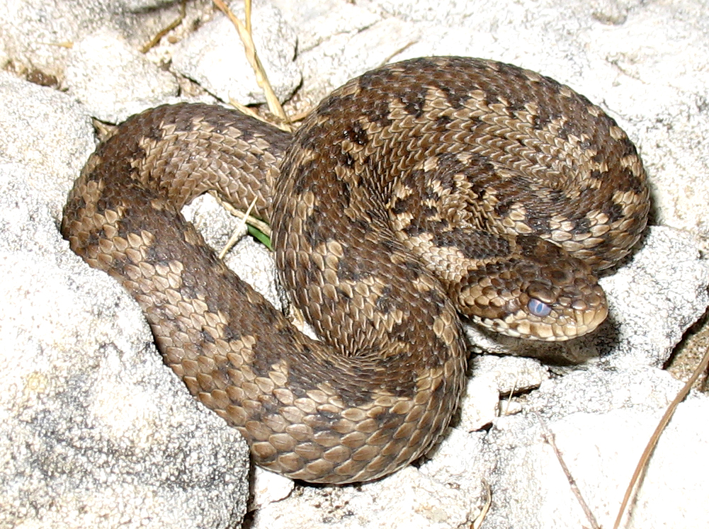 Vipera ursinii macrops; Mount Dinara; Croatia